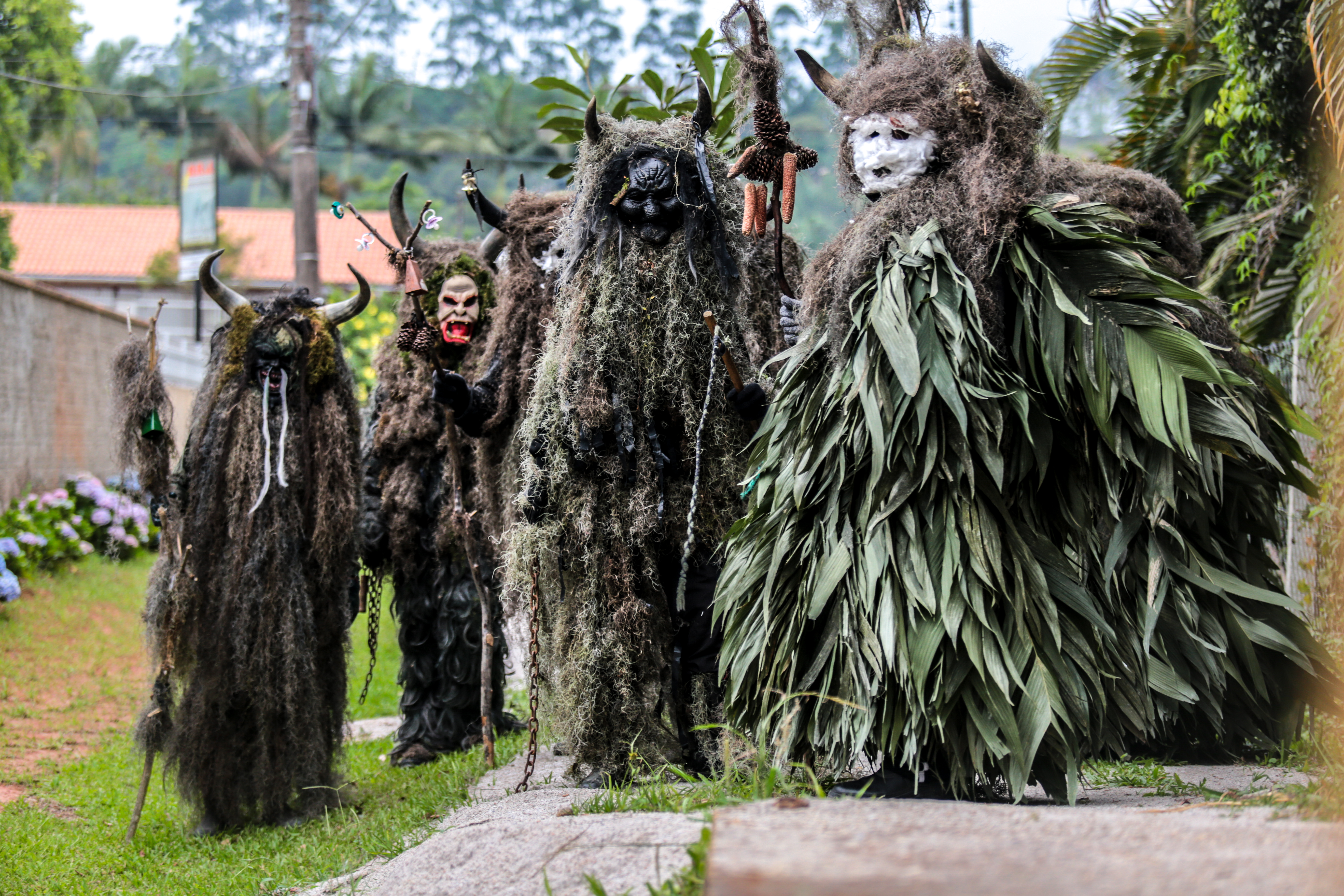 Na foto consta os Pelznickel da cidade de Guabiruba.